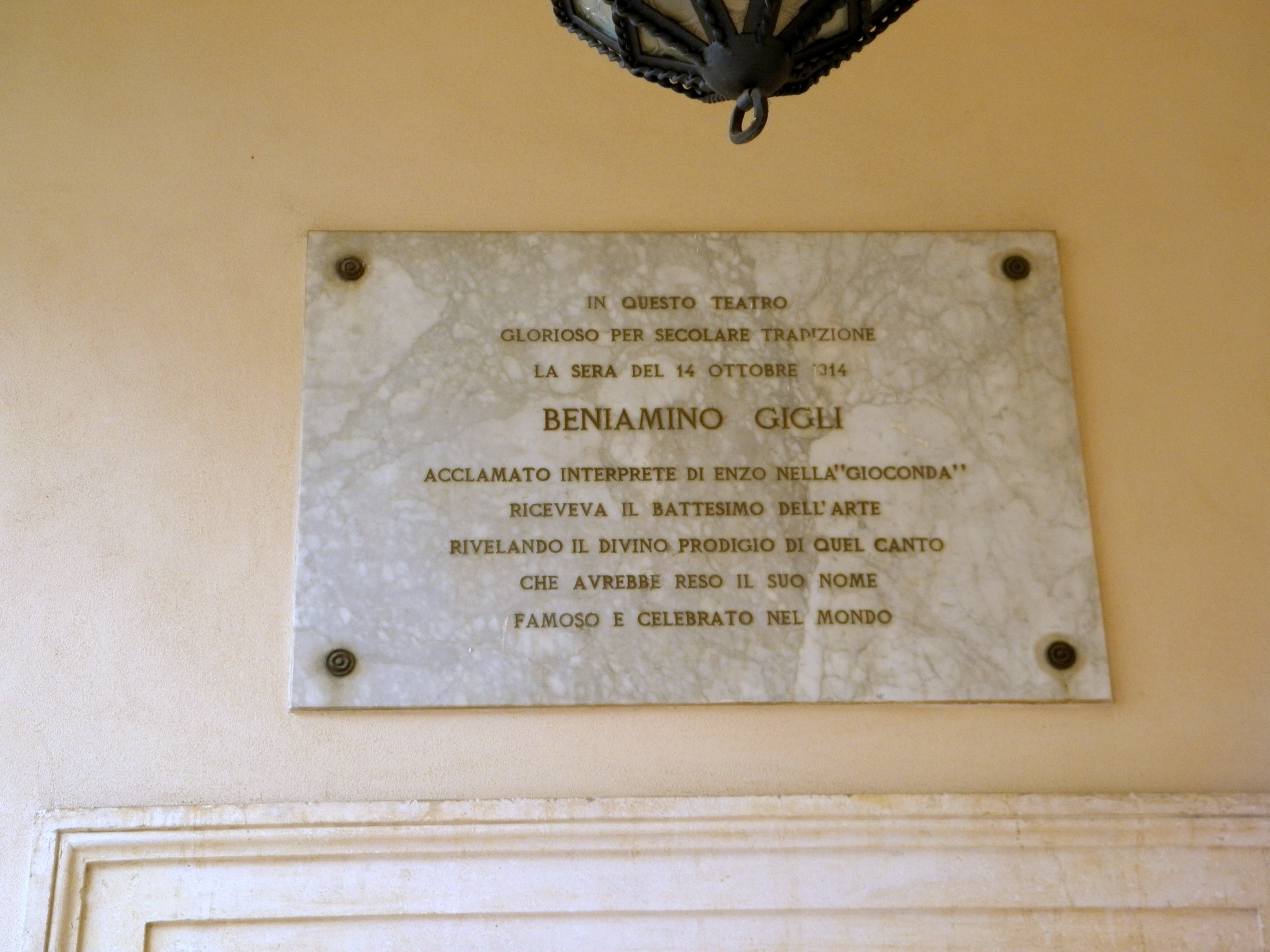 Lapide commemorativa dell'esordio professionale di Beniamino Gigli che interpretò Enzo nell'opera lirica La Gioconda nel Teatro Sociale di Rovigo.